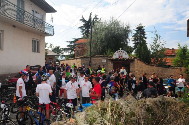 Велосипедска прошетка - Културното наследство низ Прилепското Поле, 2014